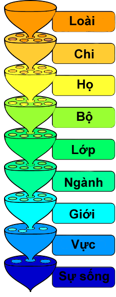 Vương Ngân Hà Việt hóa theo hình Biological classification L Pengo.svg trên Commons do Peter Halasz (User:Pengo) truyền lên Commons ngày 24/3/2007.